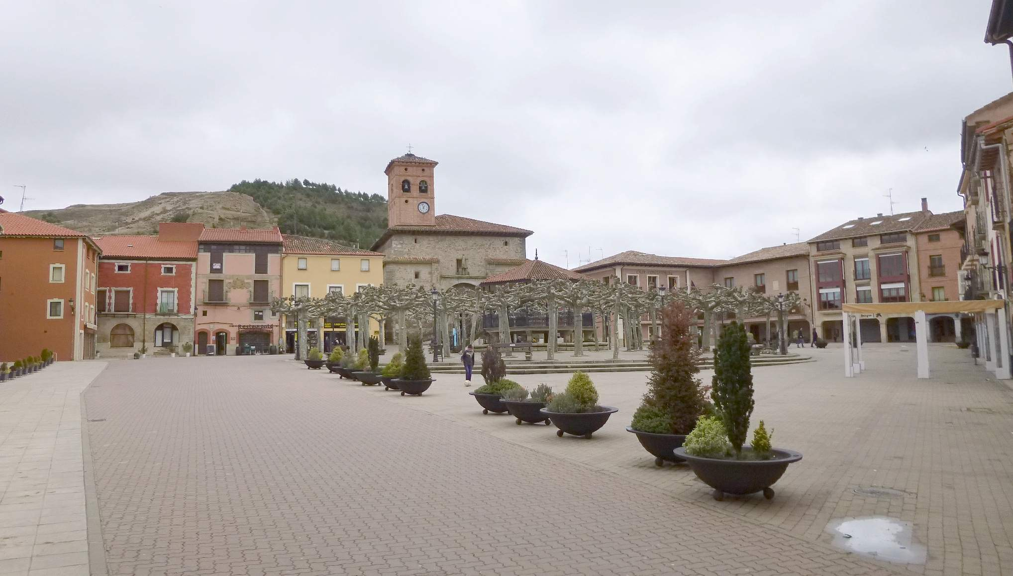 Plaza Mayor de Belorado (Burgos)